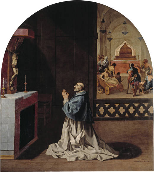 El padre Artaldo rezando en la cartuja de Portes.label QS:Les,"El padre Artaldo rezando en la cartuja de Portes."